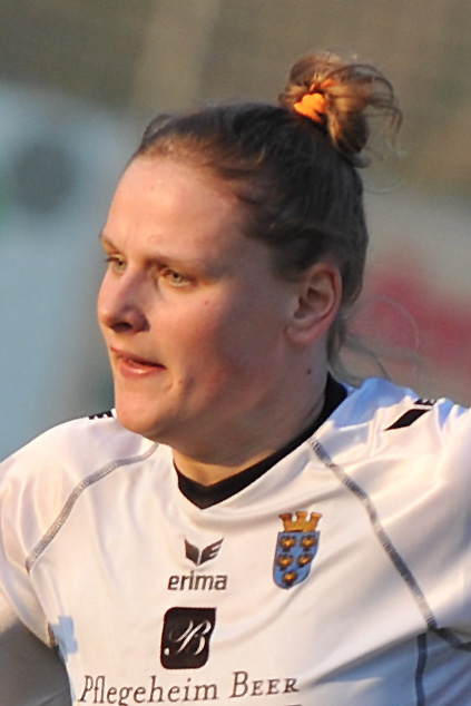 UEFA Women's Champions League 2013/14 SV Neulengbach - Tyresö FF Neulengbach, 29. März 2014 Dominika Škorvánková